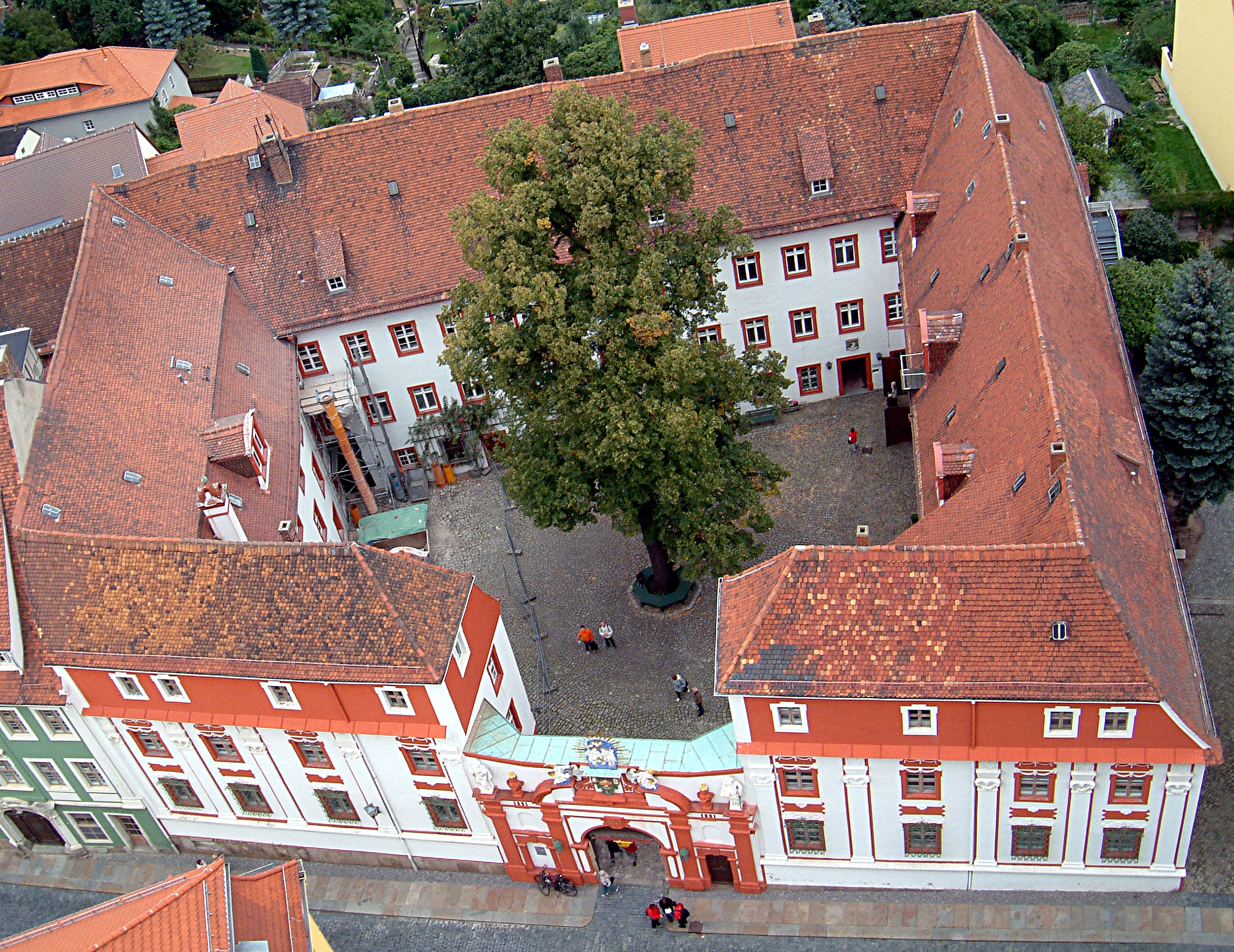 Bautzen,_Domstift (Blick vom Turm des Doms St. Petri)